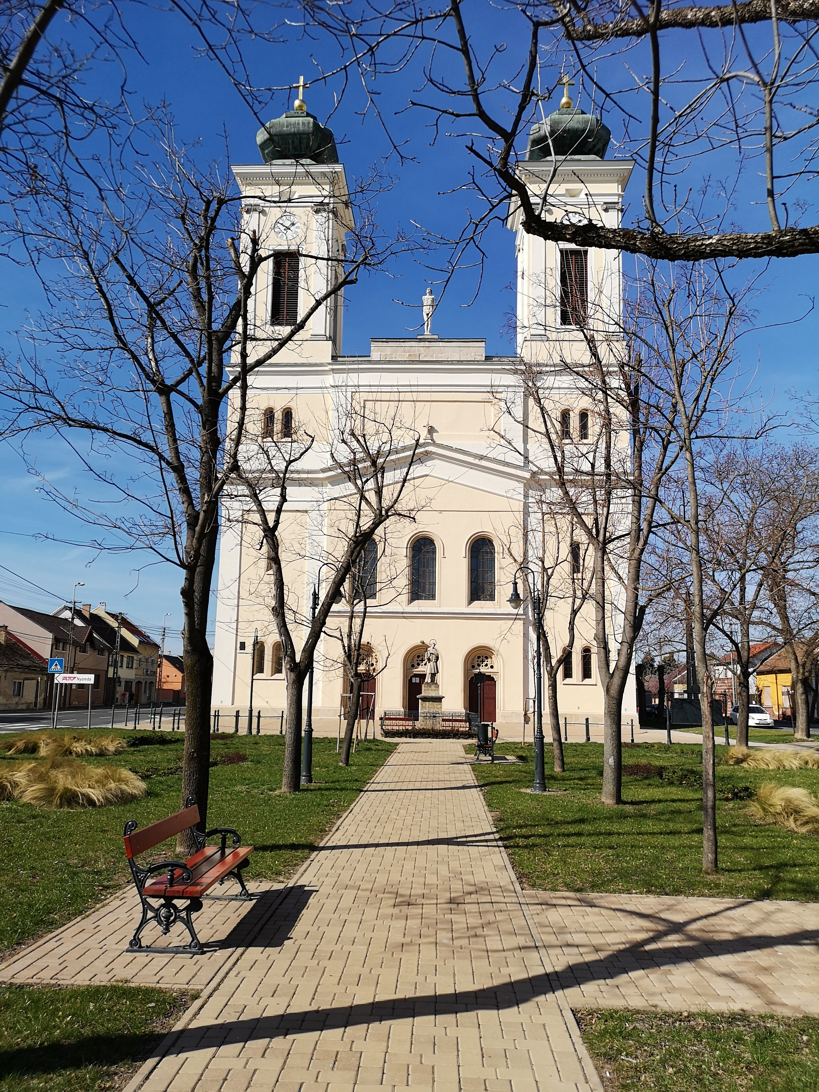 Felsővárosi római katolikus (Szt. Sebestyén) plébániatemplom This is a photo of a monument in Hungary. Identifier: 3868